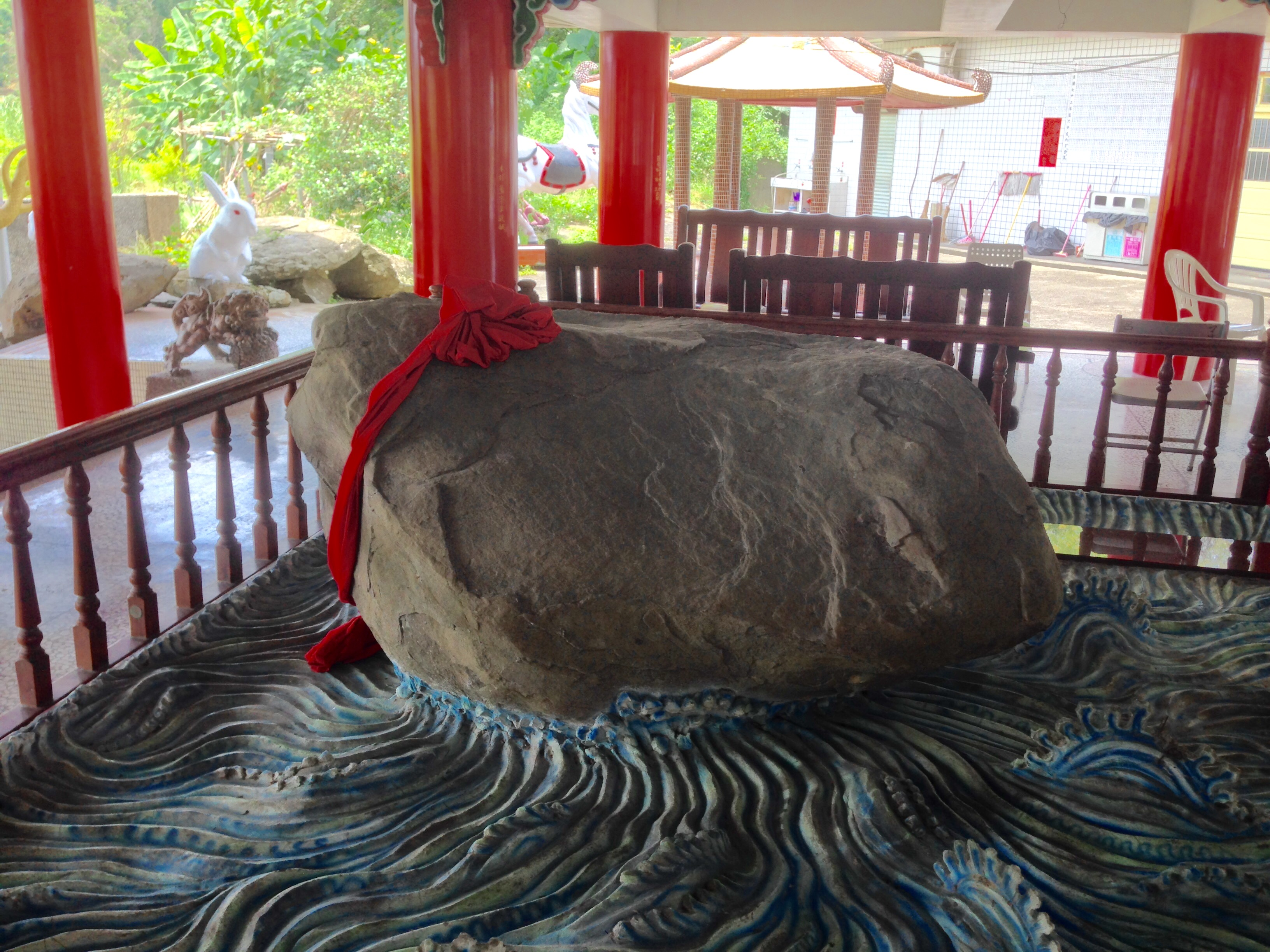 中文（台灣）: 石聖爺廟石頭公